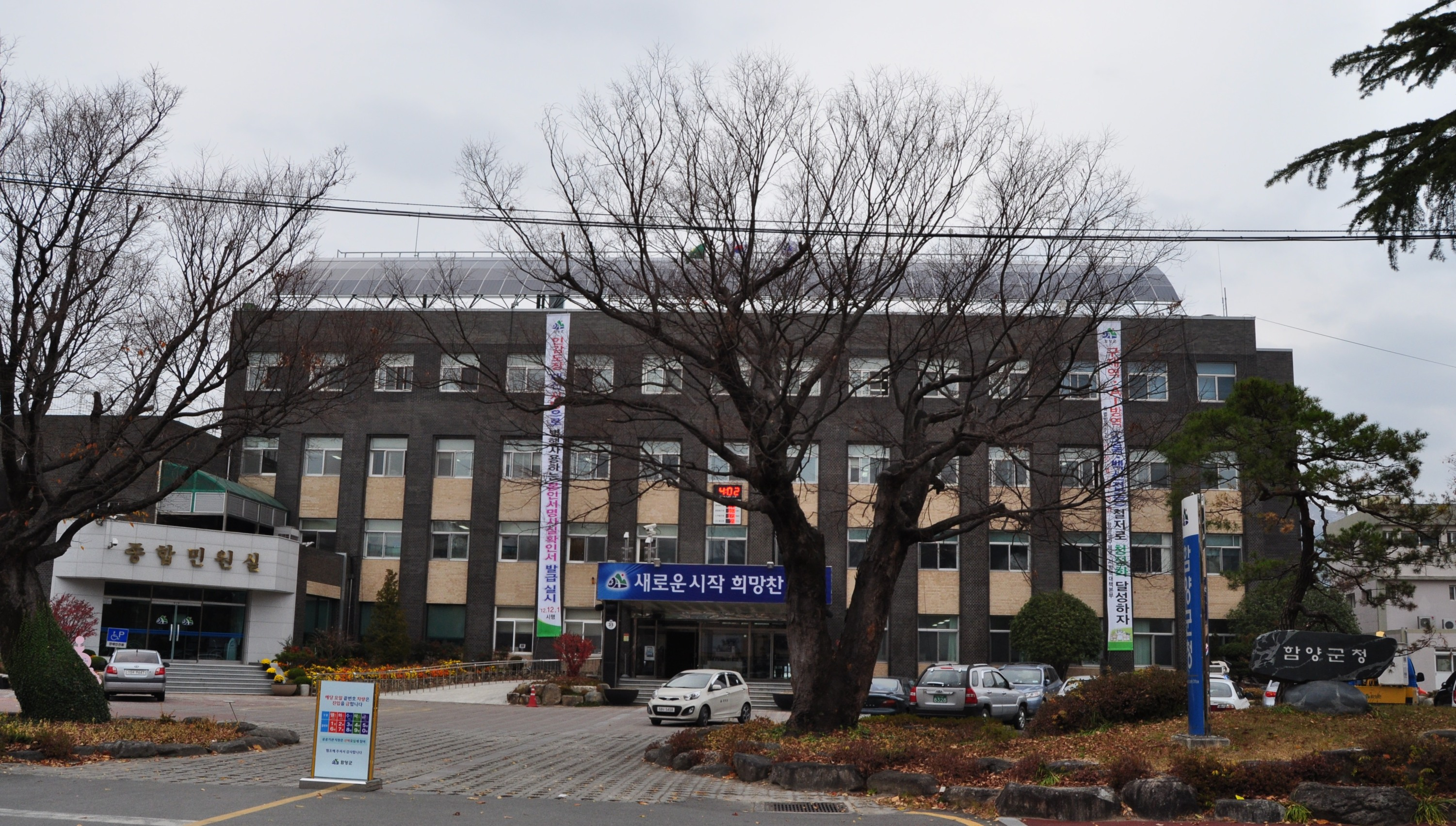 함양군청 함양군 함양읍 소재